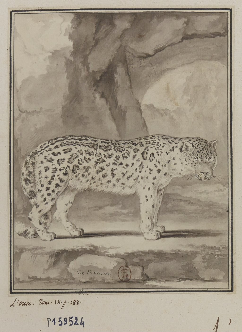 L'Once, Dessin pour Histoire naturelle générale et particulière par M. de Buffon A Paris, de l'imprimerie royale 1761 Éd. in-4 T. IX, pl. XIII, p. 188